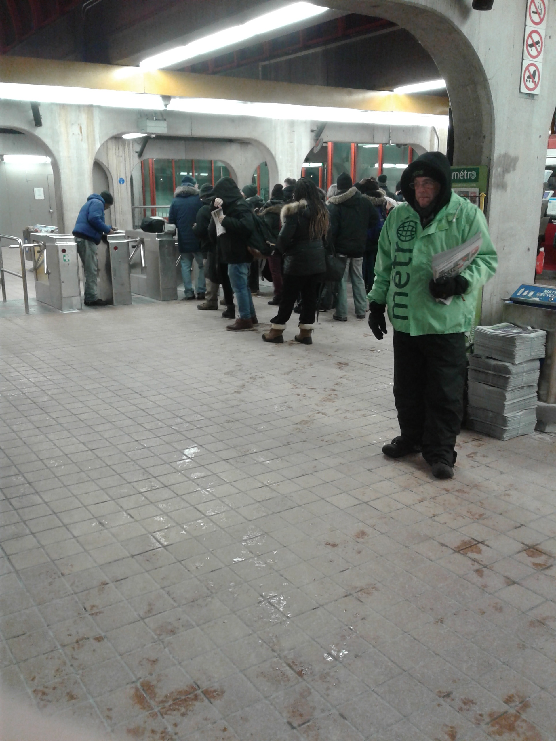 Station Angrignon du métro de Montréal